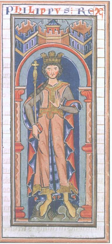 Philipp von Schwaben. Chronica regia Colonensis (Brüssel, Bibliothèque Royale, Ms. 467.)